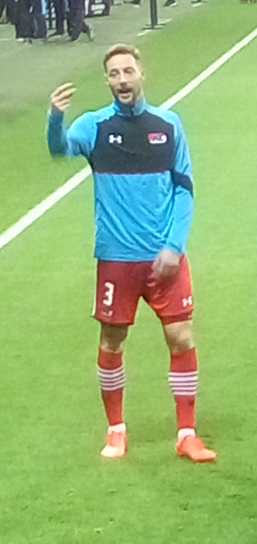 Rens van Eijden à l'échauffement avant OL-AZ Alkmaar en seizièmes de finale de la Ligue Europa 2016-2017.